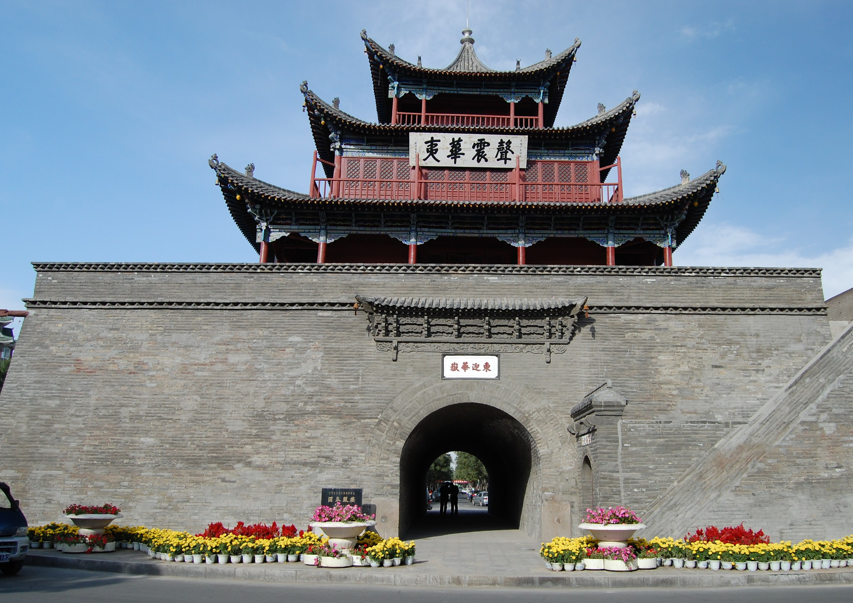 Alte Stadtbefestigung in Jiuquan, Provinz Gansu, China